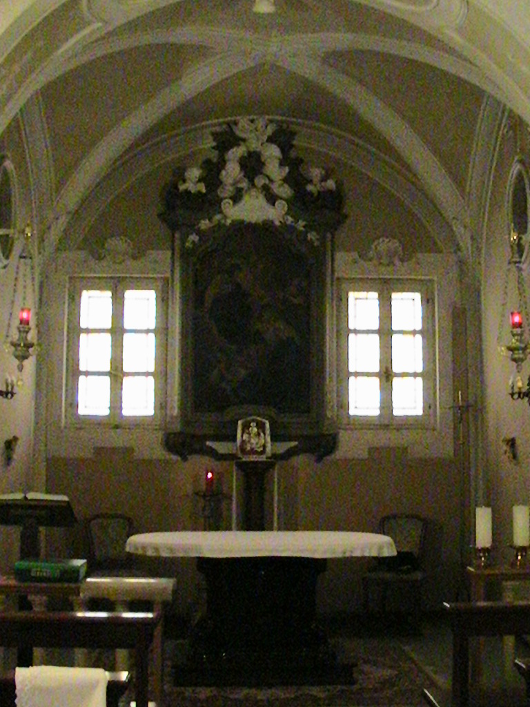 Busseto - Convento di Santa Maria degli Angeli - Cappella interna